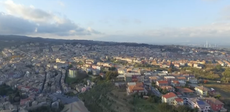 Parte di Girifalco (cz) veduta dall'alto, da corso Garibaldi (sx) al rione Pioppi Nuovi (dx)